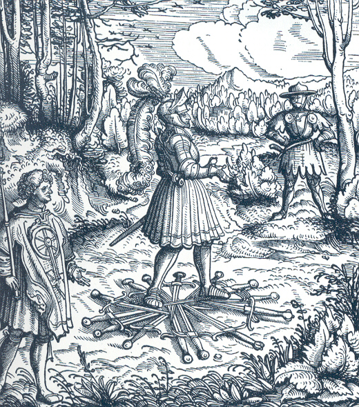 Theuerdank. Holzschnittillustration zu Kapitel 118 (ursprüngliche Fassung)